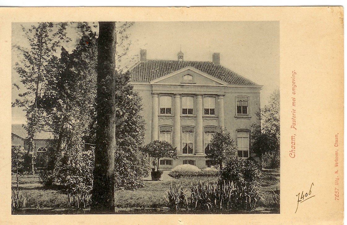 Briefkaart "Pastorie Chaam"